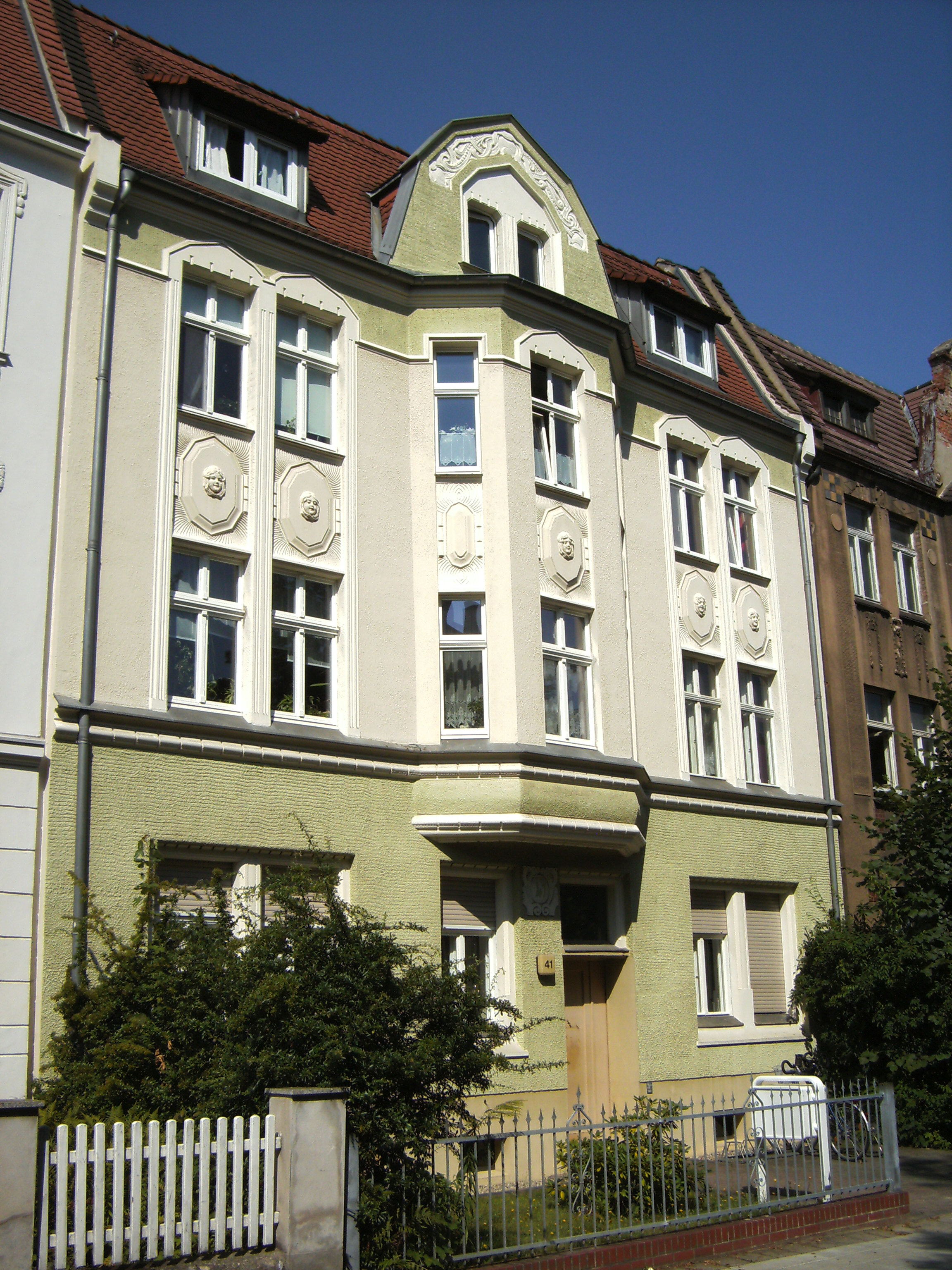 Wernerstr. 41